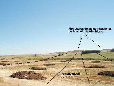 Imagen de un glacis en las proximidades de Almudévar (Huesca). la imagen aparece comentada.